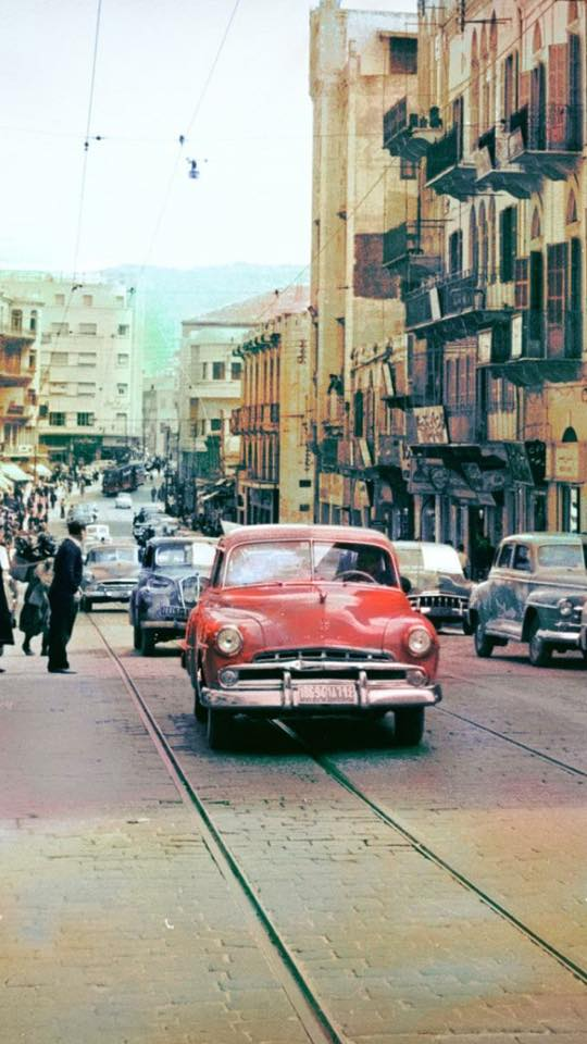 بيروت شارع ويغان عام ١٩٥٥